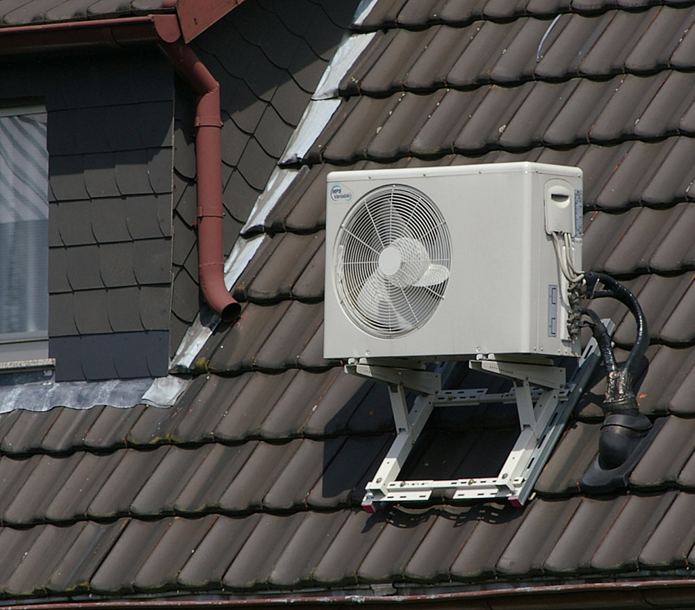 Außenmodul einer typischen Split-Klimaanlage, hier auf dem Dach eines Einfamilienhauses